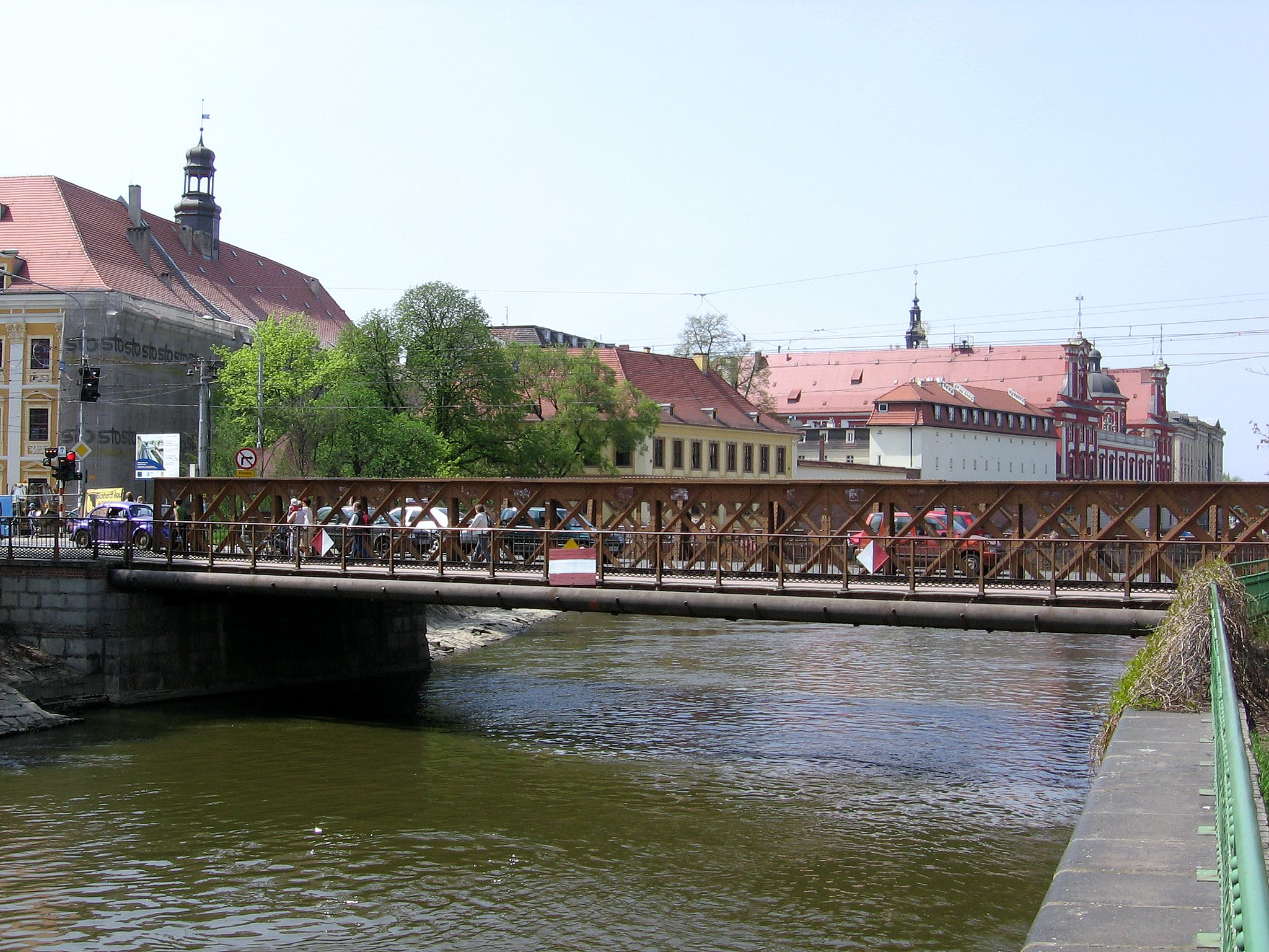 Most Piaskowy - Sand Bridge in Wrocław, Poland